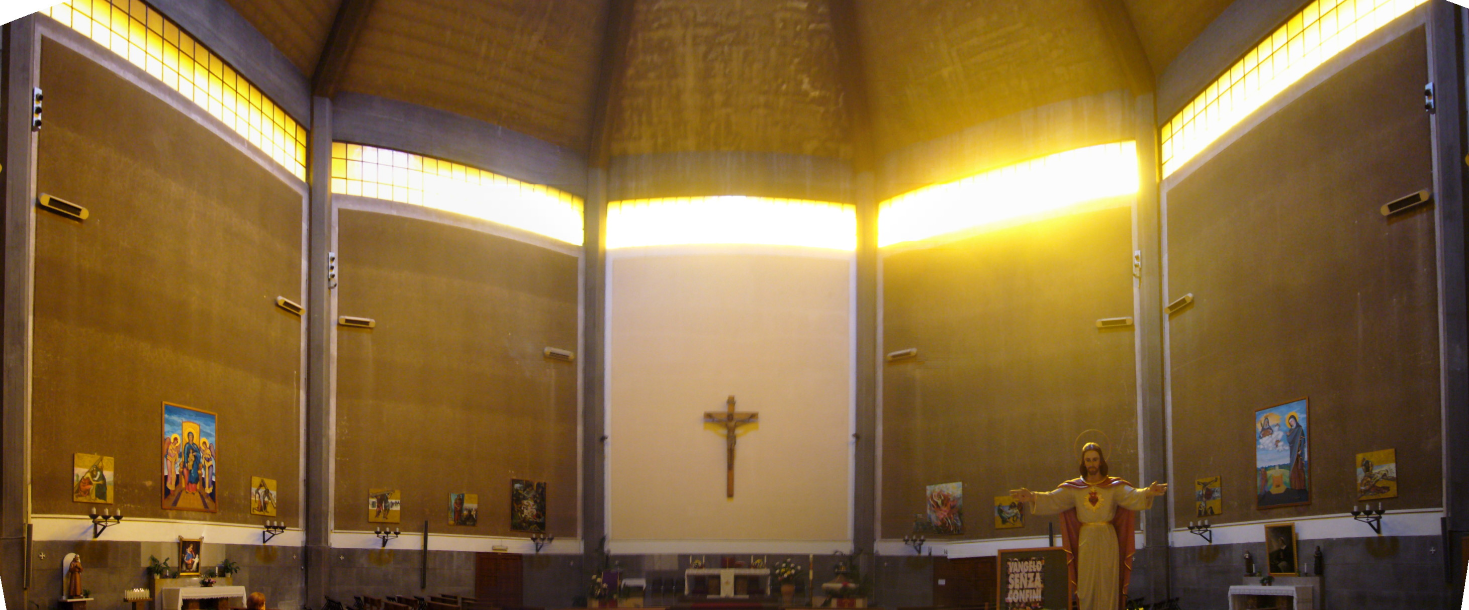 Roma, Sant'Angela Merici, interno